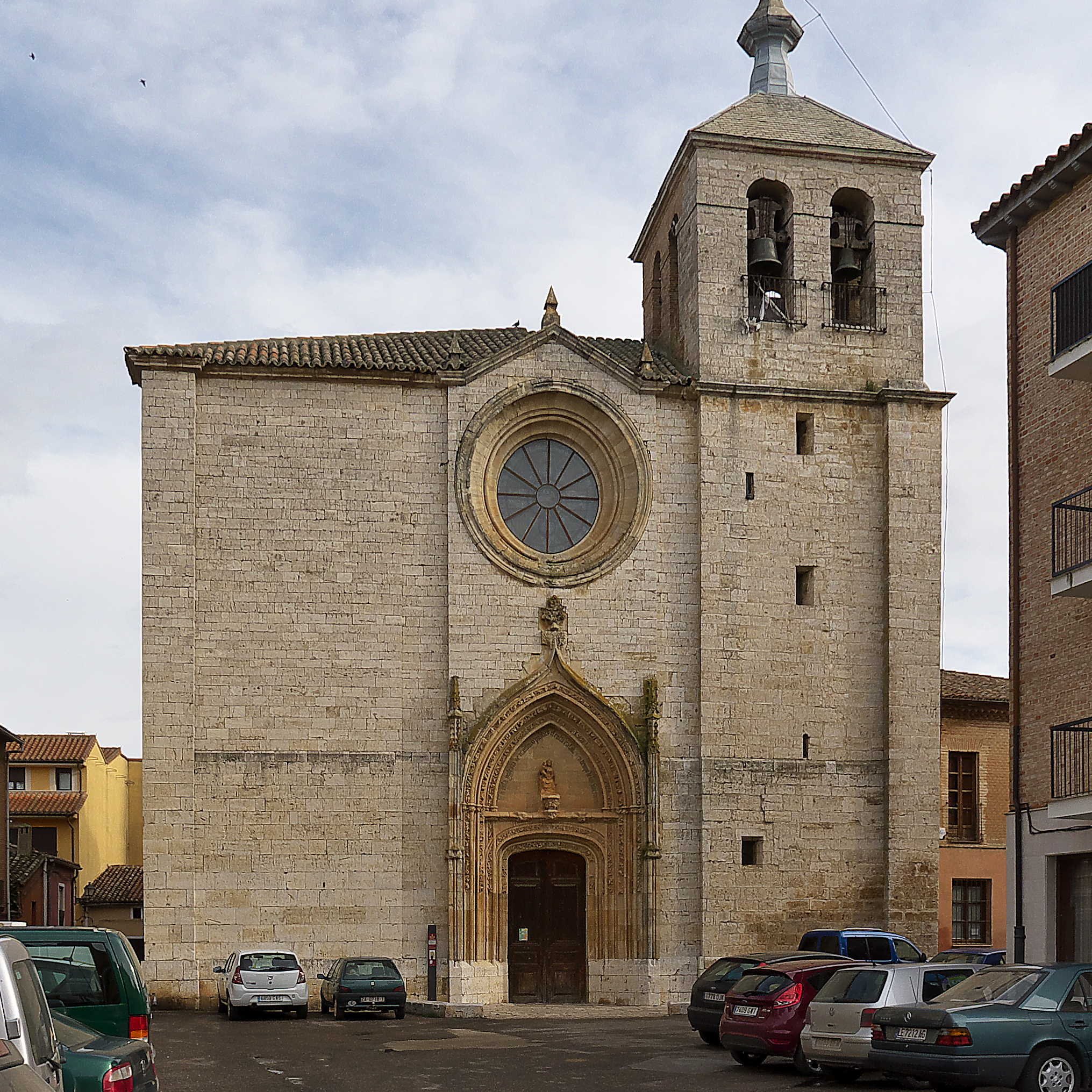 Hastial de los pies.